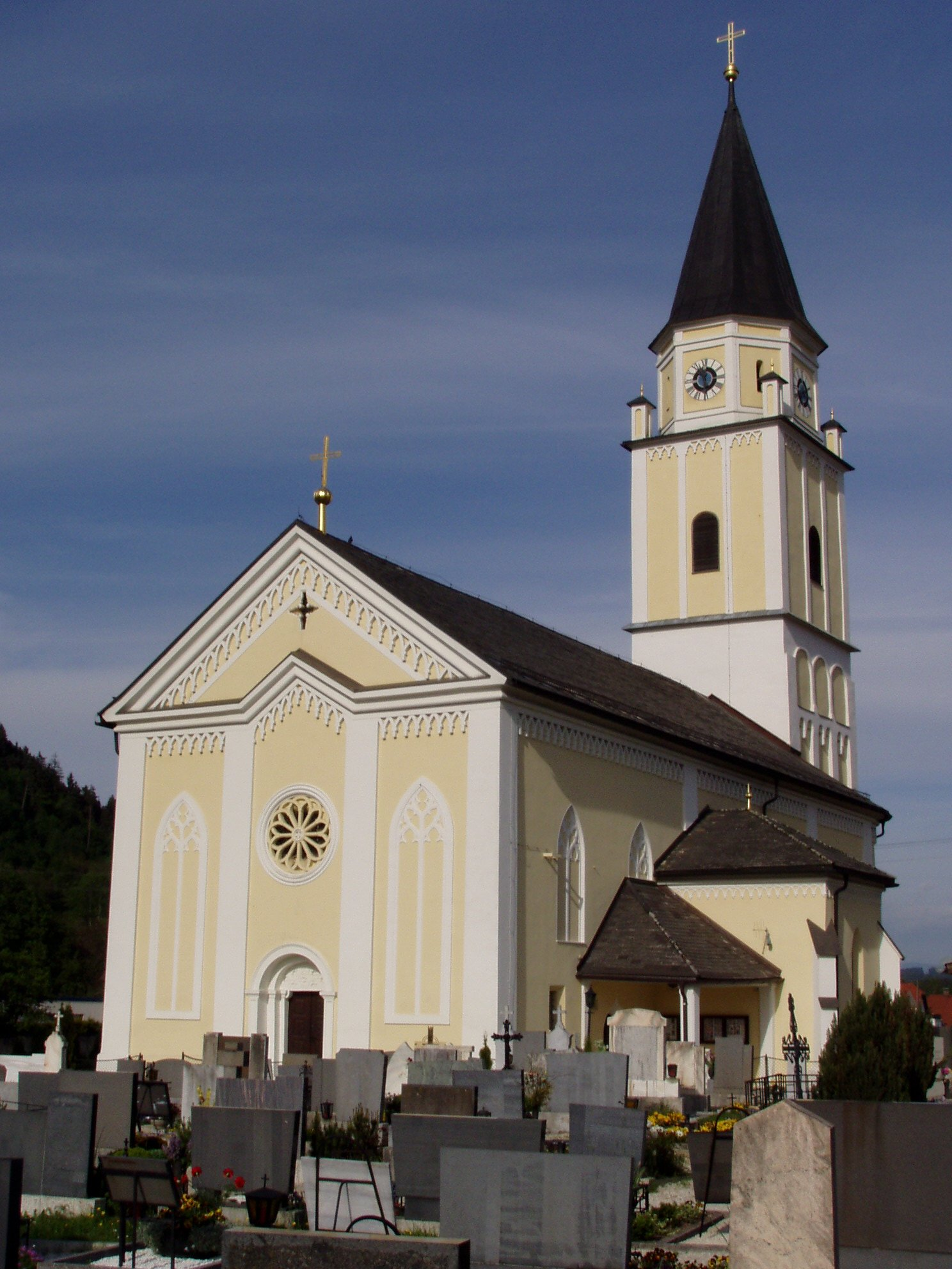 Pfarrkirche St.Ruprecht in Völkermarkt Kärnten/Church St.Ruprecht, Völkermarkt, Carinthia